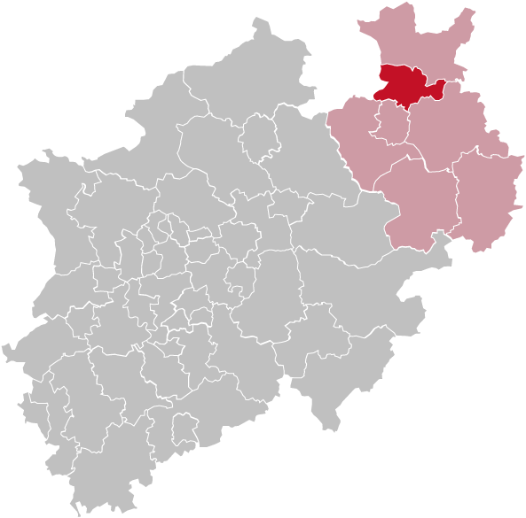 Karte Nordrhein-Westfalens mit dem Kreis Herford